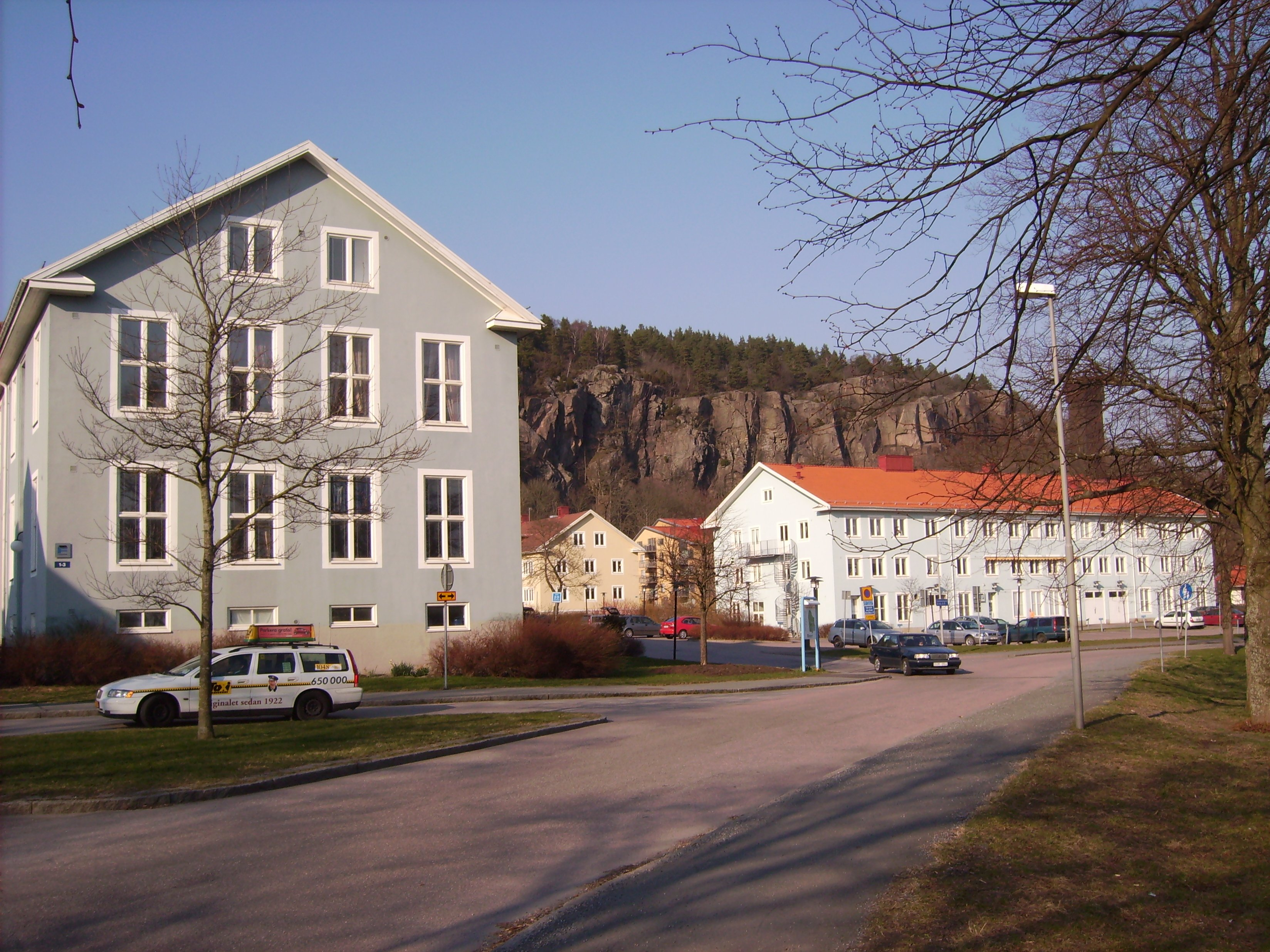 Bilden är fotograferad av Harri Blomberg. Photo by Harri Blomberg.